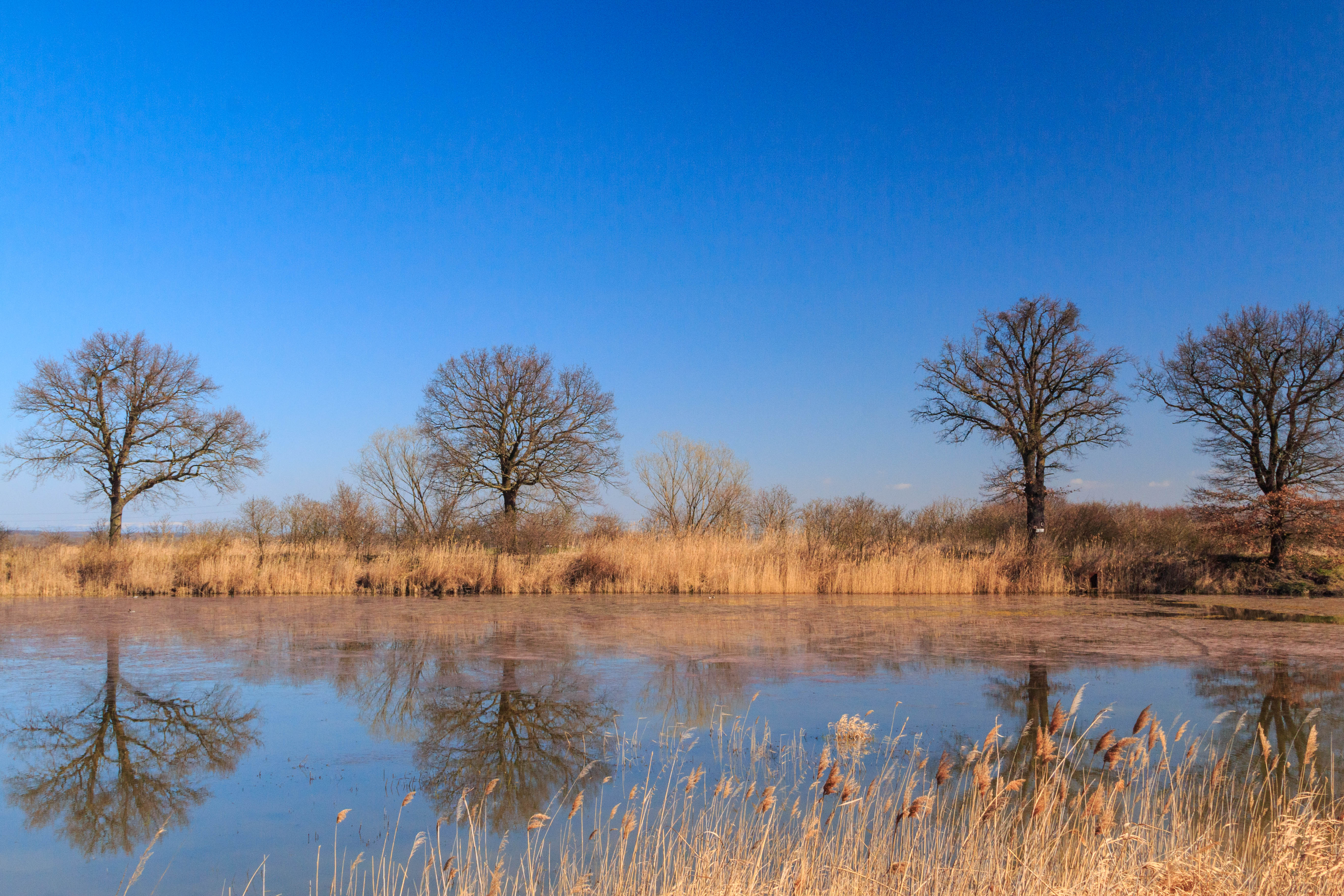 Hluboký rybník u Michnovky Project: Vodstvo.